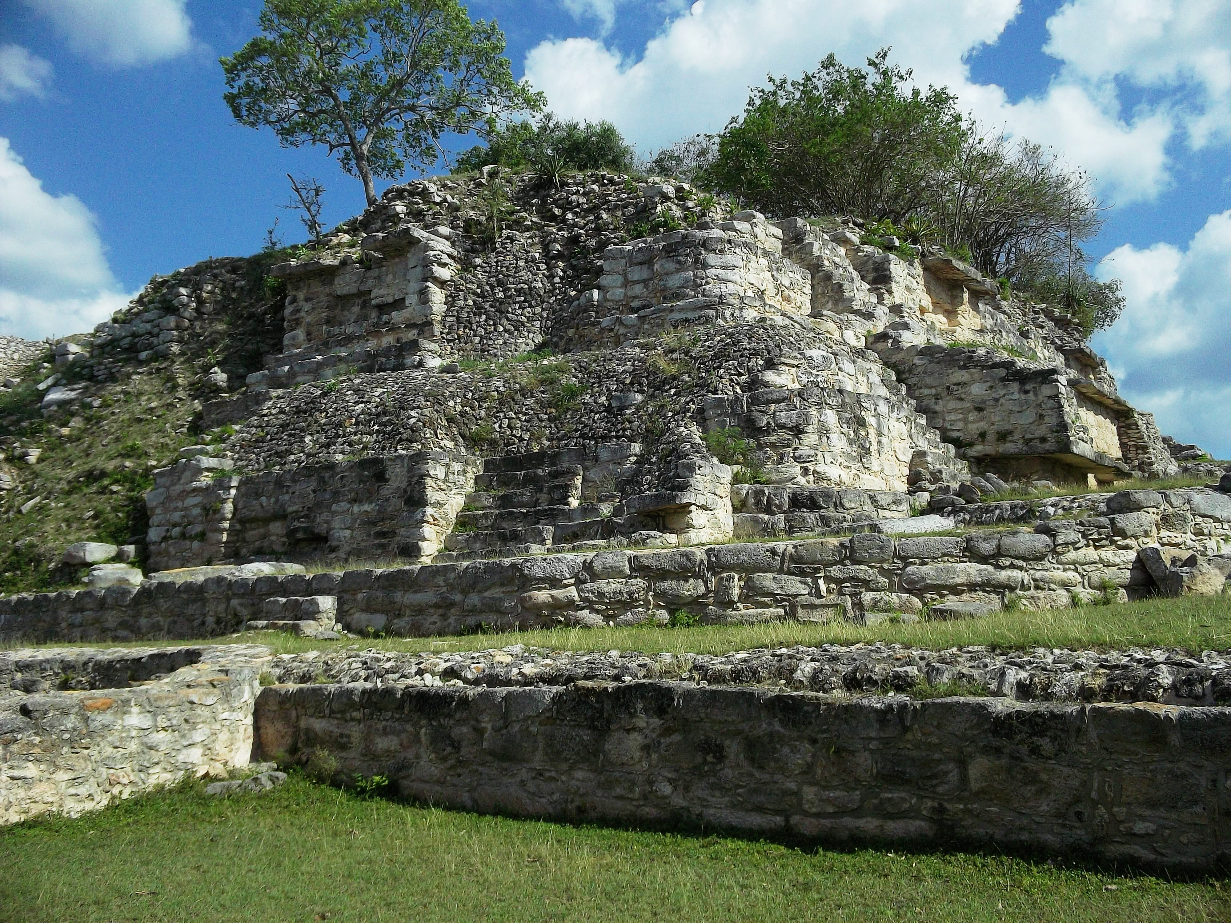 Ruinas de Aké.